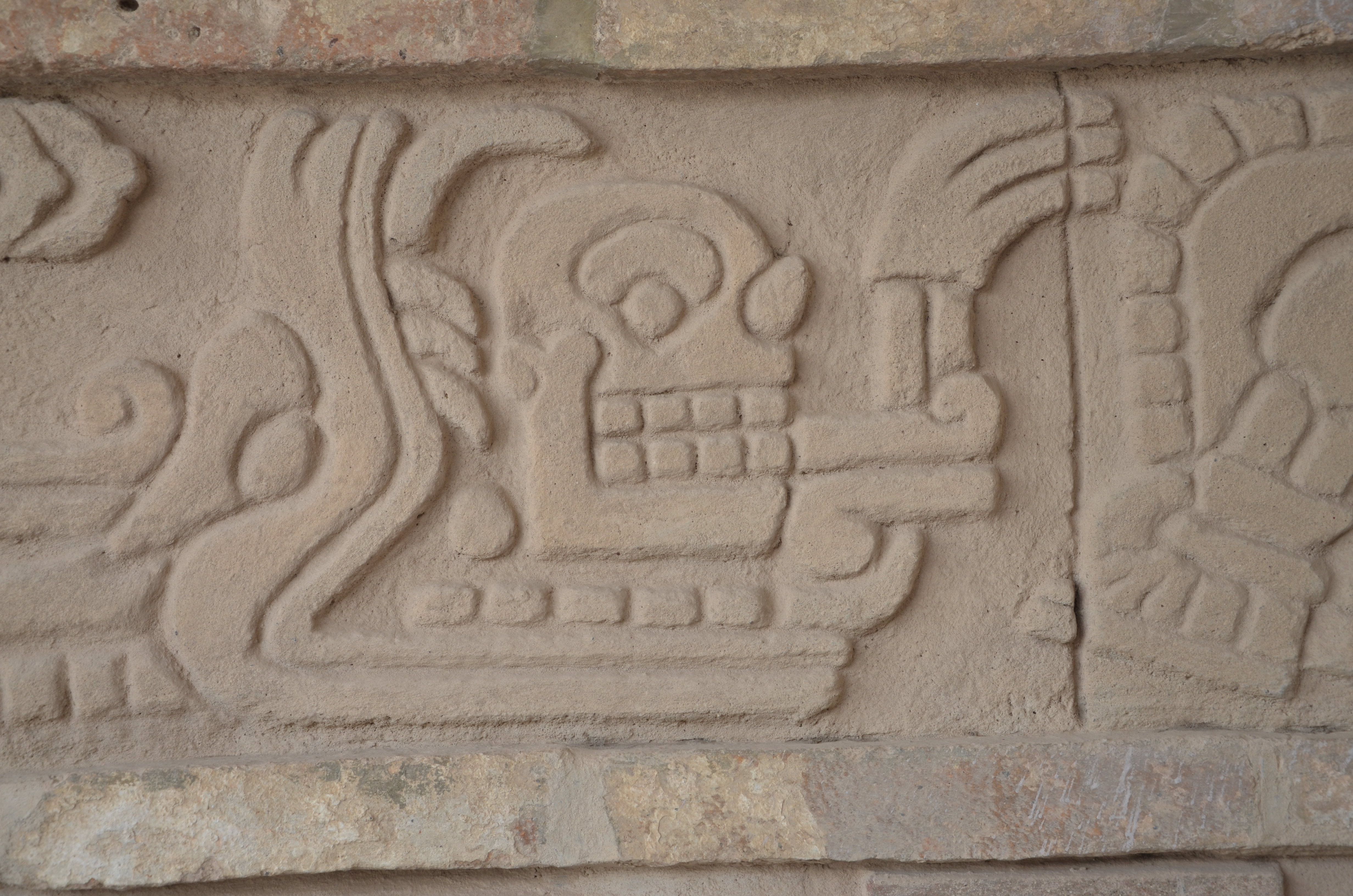 Imagen del Coatepantli o Muro de las Serpientes de la zona arqueologica de Tula Hidalgo, México